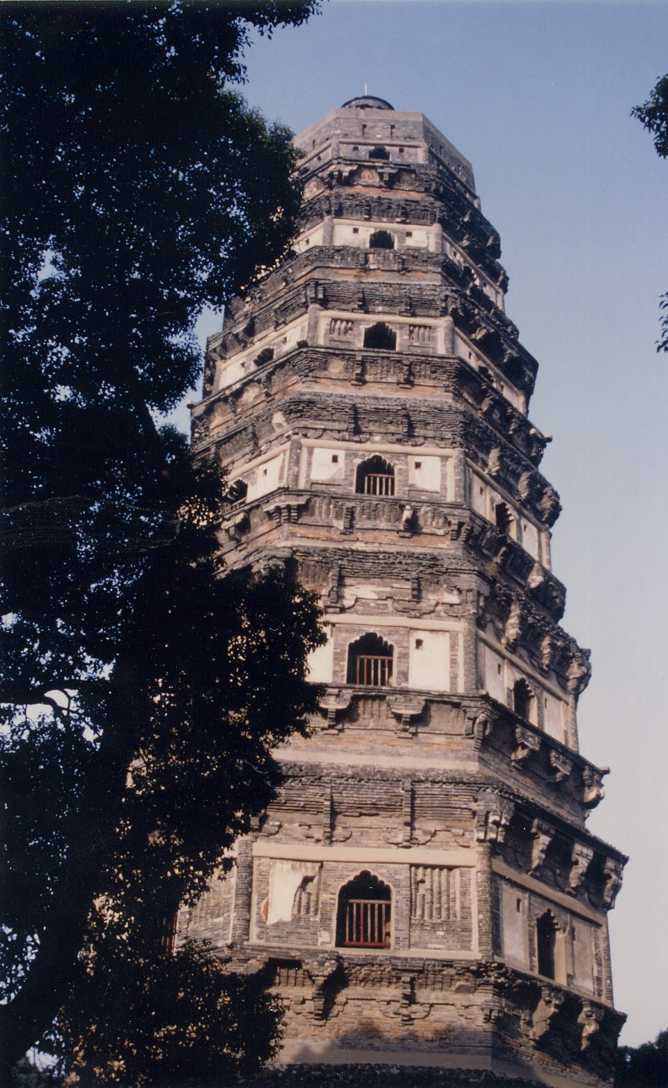 蘇州虎丘